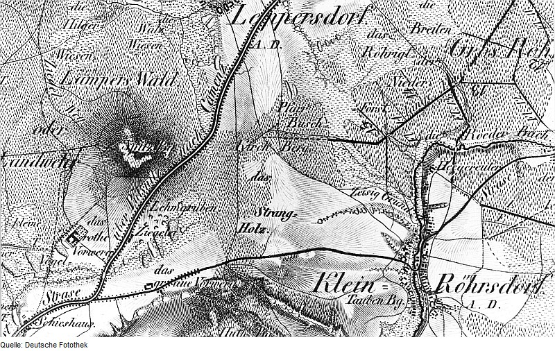 Original image description from the Deutsche Fotothek Wachau-Leppersdorf. Oberreit, Sect. Dresden, 1821/22